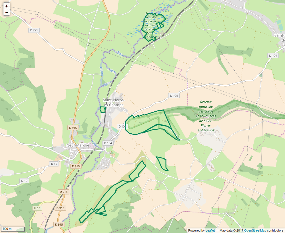 Périmètre de la RNR des Larris et tourbieres de Saint-Pierre-es-Champs.